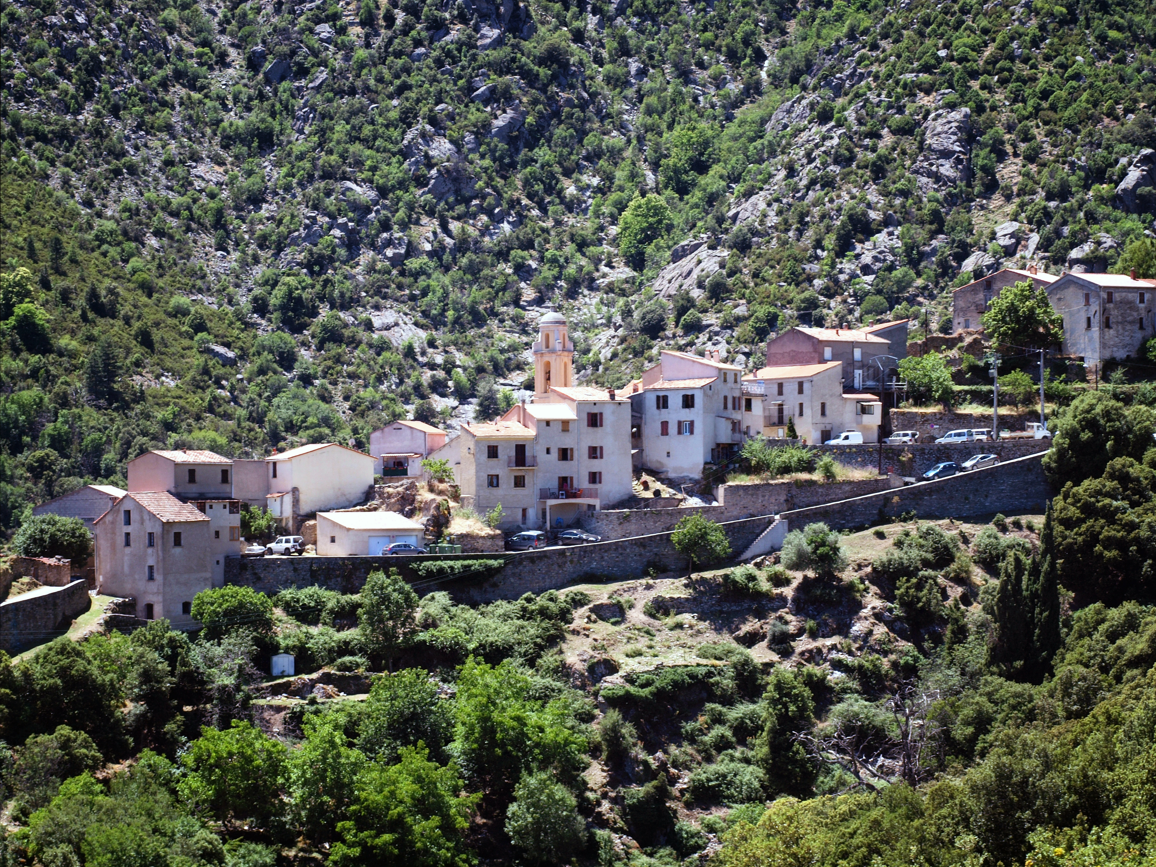 Castiglione, Giovellina (Corse) - Vue du village